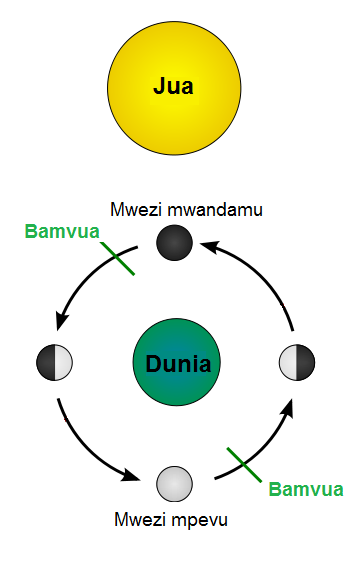 Kiswahili: Kutokana na Tide_schematic.svg, nimeiswahilisha. Sijakuta neno kwa !"nipp tide" kwa hiyo nimeiondoa. Kama mtu analijua jina hili naomba niarifiwe!